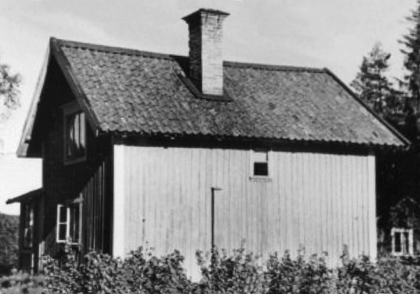 Torpet Lugnet mot väster.